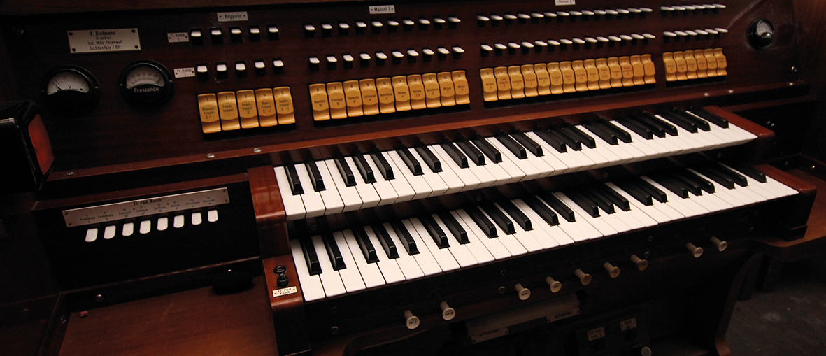 Spieltisch (seit 1960; Detail) der Strebel-Orgel in St. Michael zu Stadtsteinach. Das Foto dokumentiert den Zustand 2017.